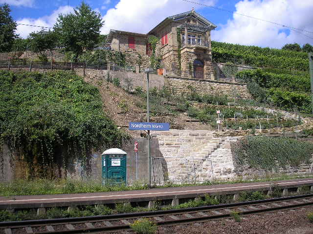 Am Bahnhof in Nordheim (Württemberg)